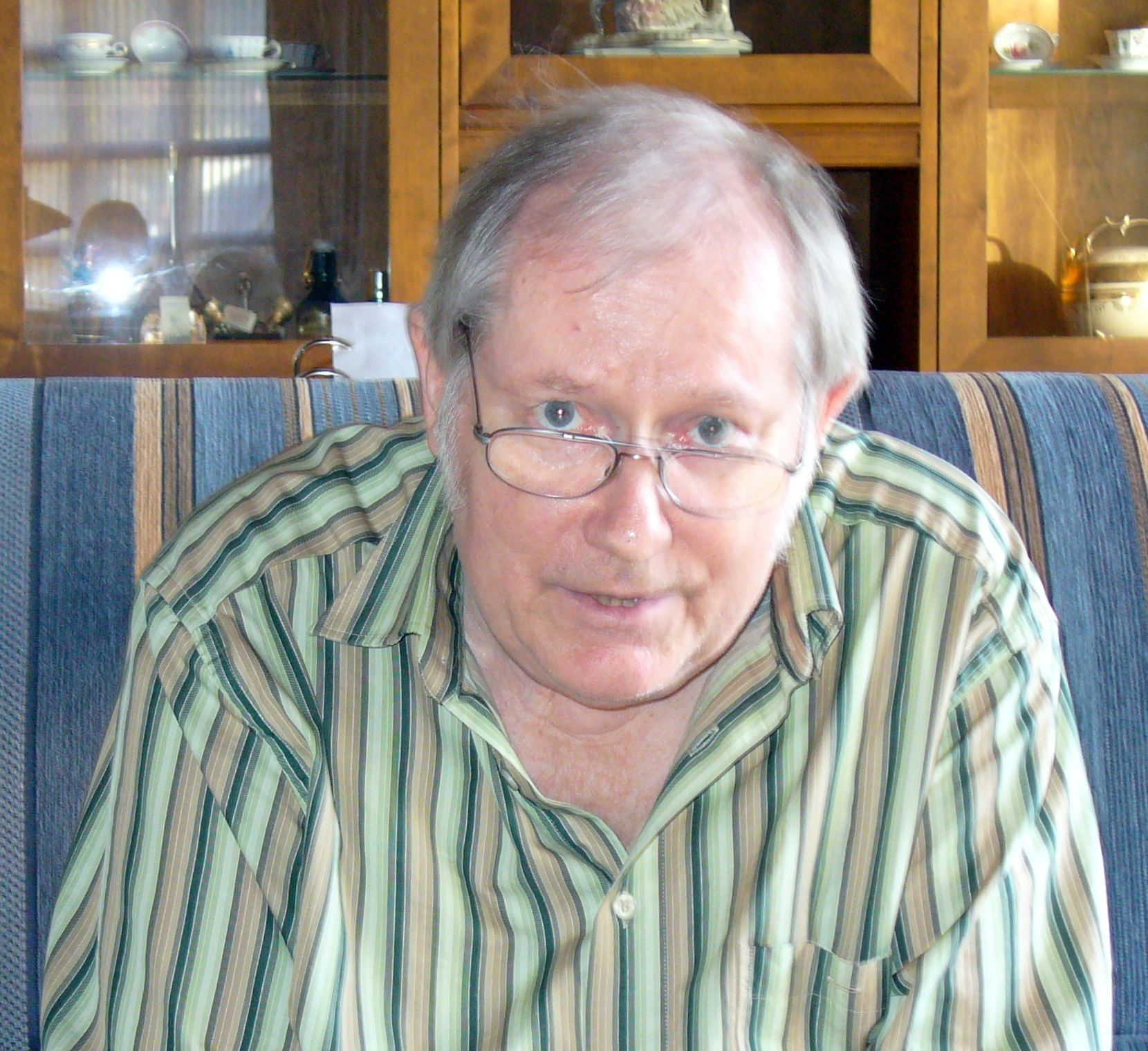 Wolfgang Thadewald (1936–2014): Deutscher Jules Verne-Experte.